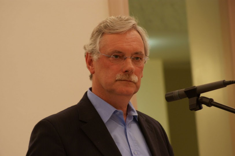 Hans van der Hoeve tijdens een gemeenteraadsvergadering in Wageningen